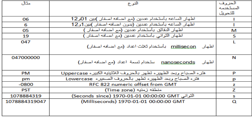 تابع تحويلات الوقت والتاريخ